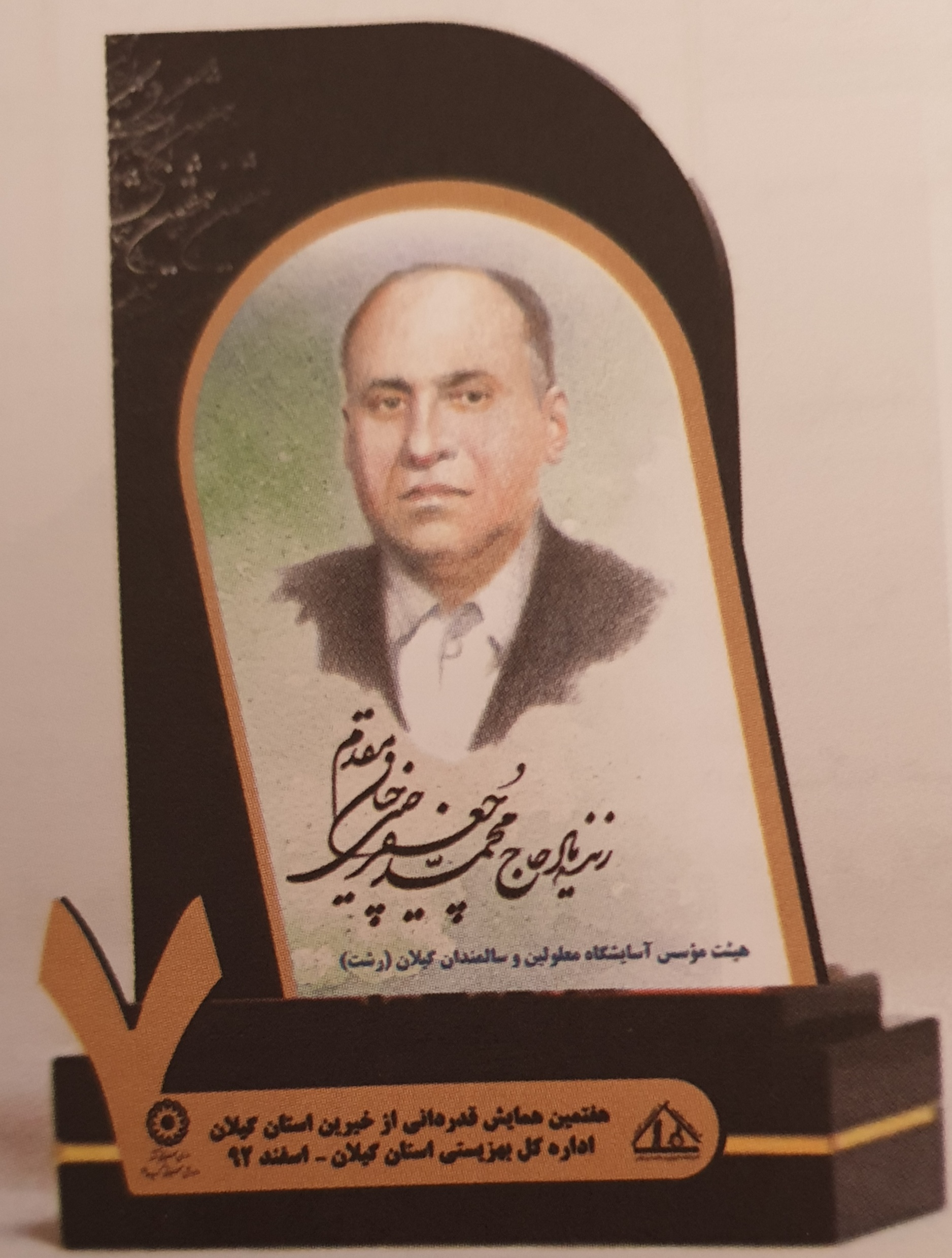 تندیس زنده یاد محمد جعفر چینی چیان